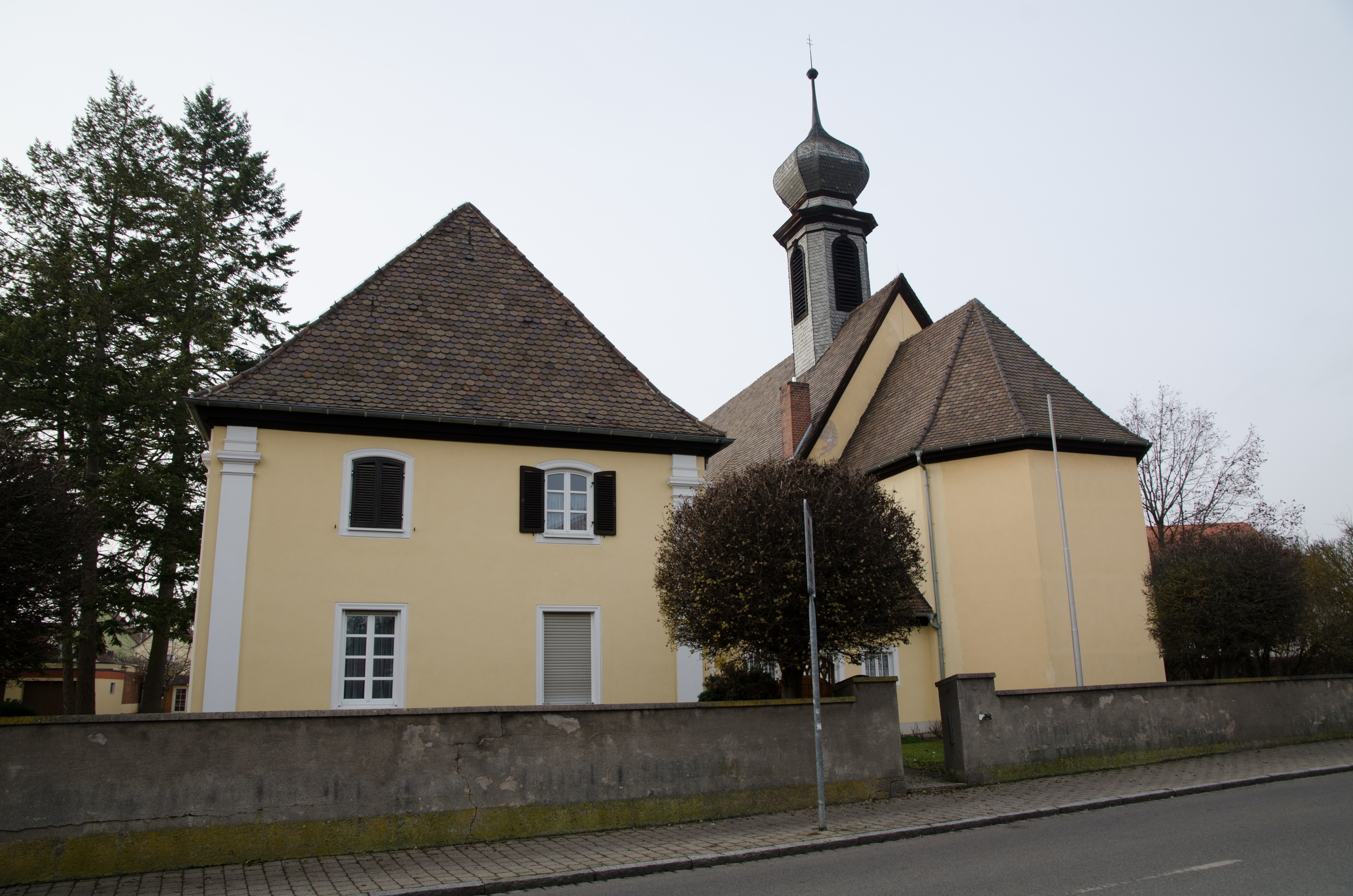 Bad Windsheim, Metzgergasse 53, kath. Kirche St. Bonmifaz mit Pfarrhaus